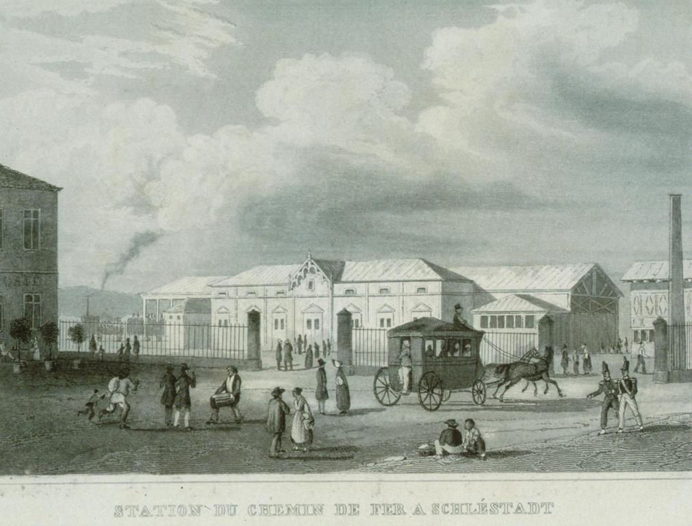 La gare de Sélestat en 1842. Auteur inconnu. Publié en 1842.